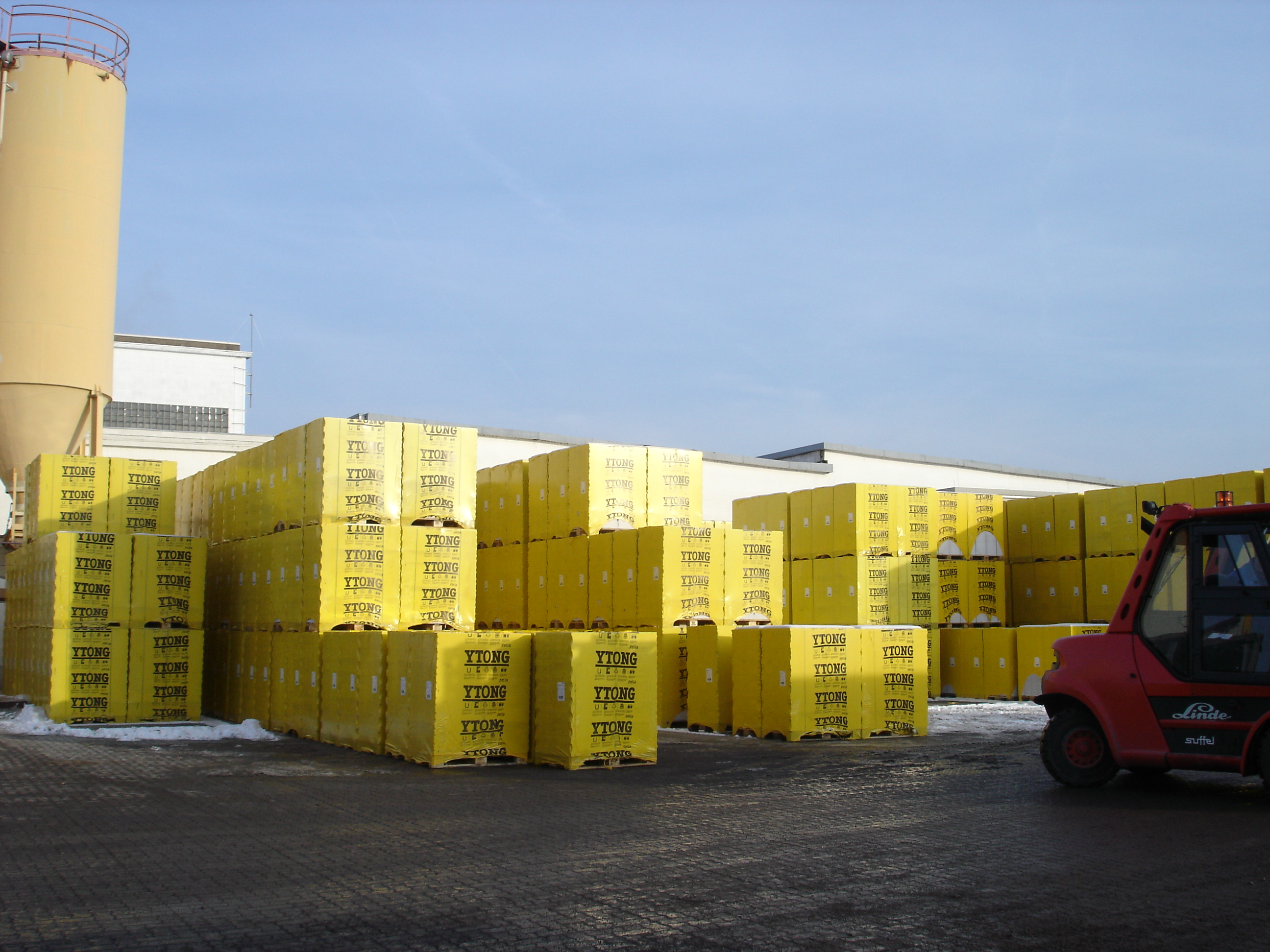 Porenbetonsteine Ytong